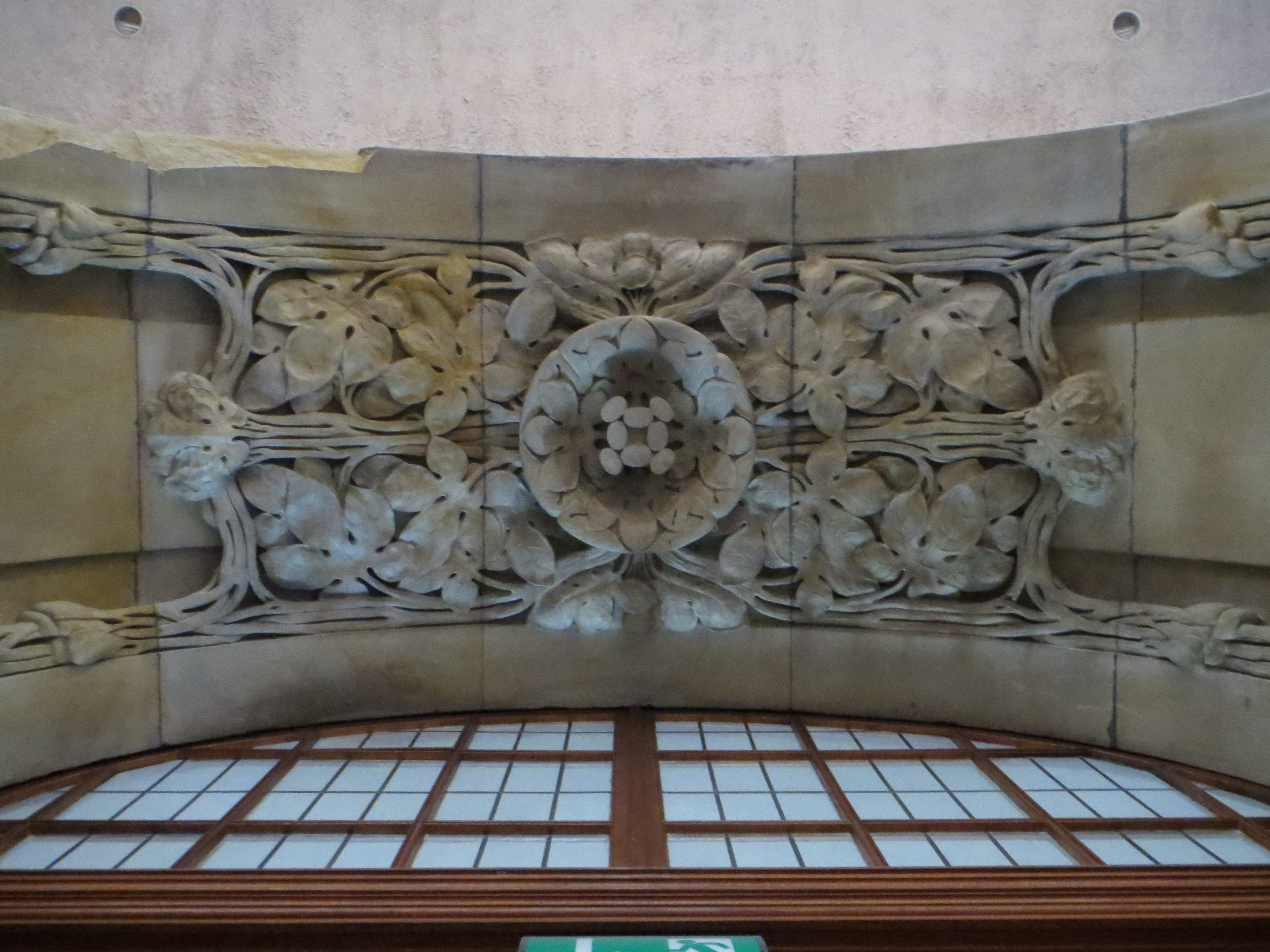 Türlaibung mit Jugendstilornamentik in der Kreuzkirche Dresden